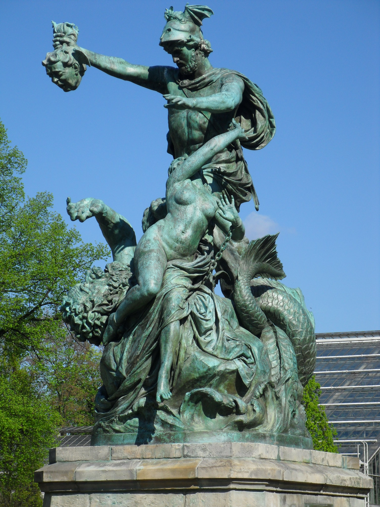 "Perseus befreit Andromeda" von Johannes Pfuhl, 1891